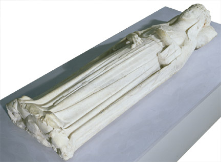 Imatge jacent de Maria de Xipre que durant molts anys es va creure que pertanyia al sepulcre l'Elionor d'Aragó.